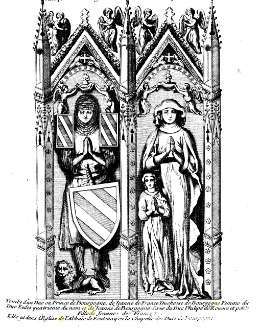 Gravure représentant le tombeau de Jeanne de France(† 1347) inhumée aux côtés d’un prince de Bourgogne et de sa petit fille Jeanne de Bourgogne († 1360) à l’abbaye de Fontenay